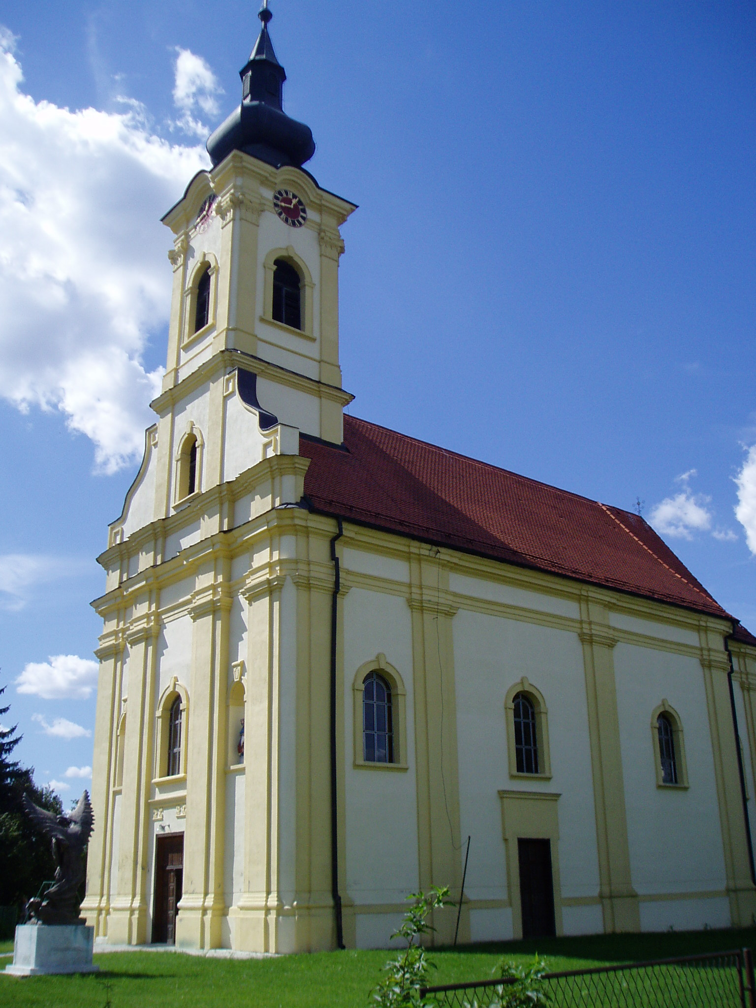 Crkva arkanđela Mihaela u Drenovcima